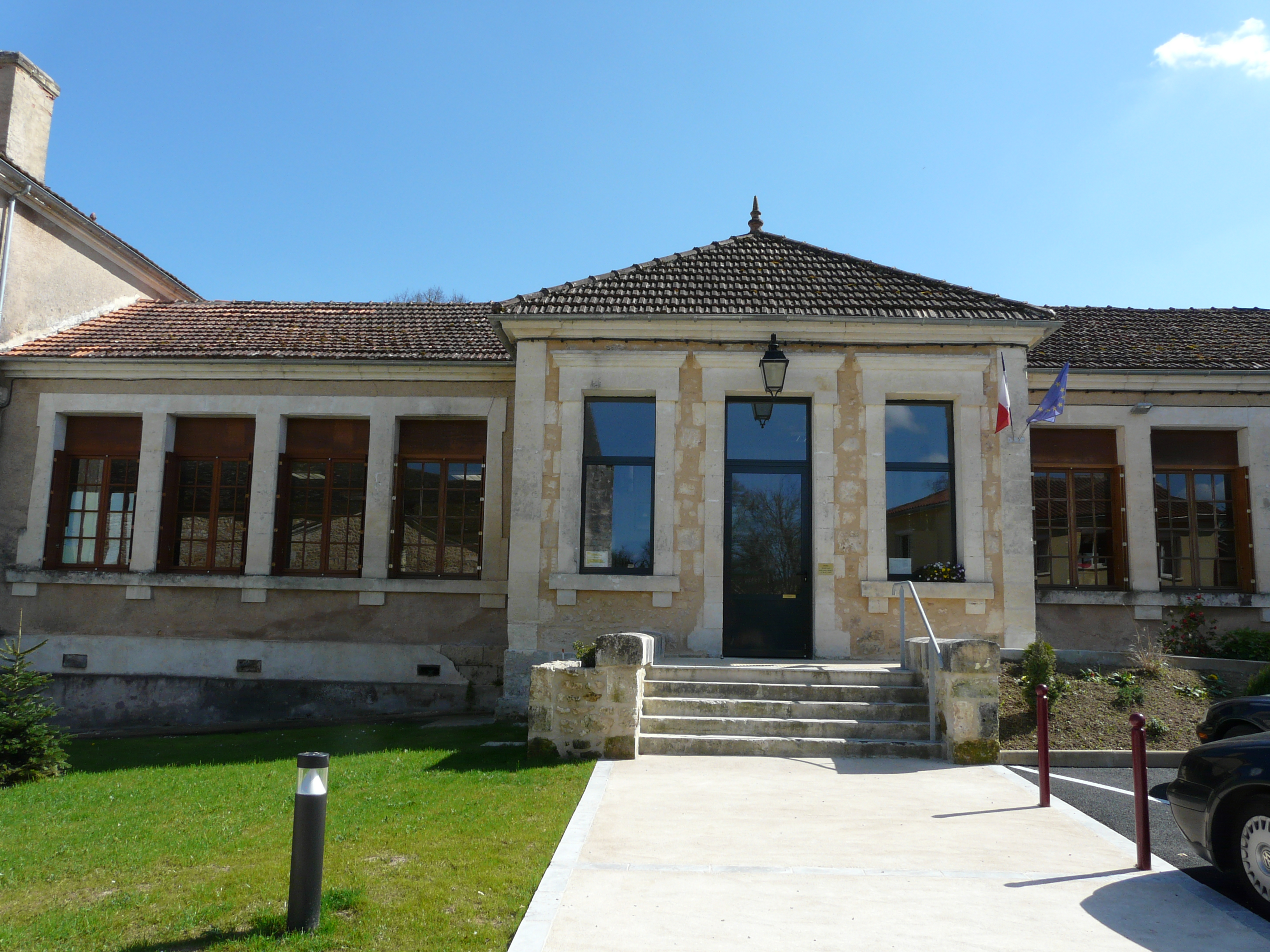 La mairie, Montagnac-la-Crempse, Dordogne, France